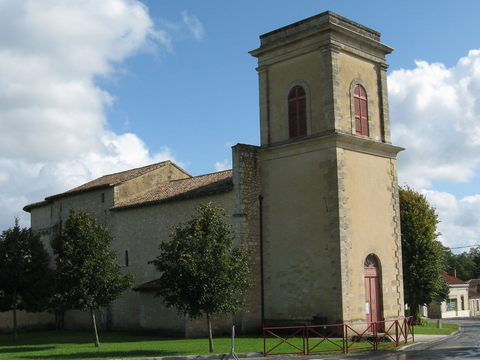 Construite au 12e s, restauration et ajouts au 19e s. Vue du nord ouest. ISMH 1925. .